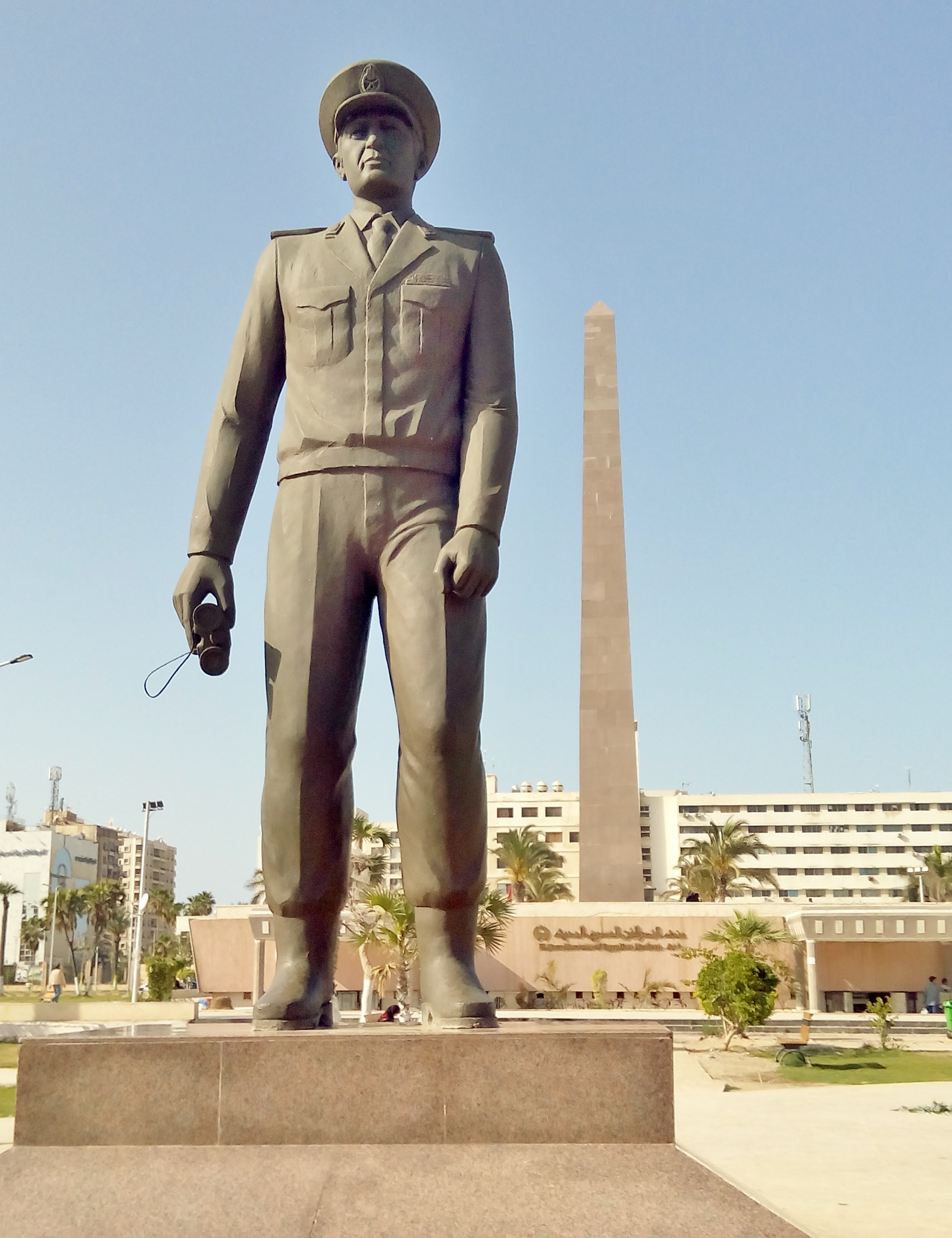 الفريق عبد المنعم رياض رئيس أركان حرب الجيش المصري الجنرال الذهبي ورمز شهداء العصر الحديث